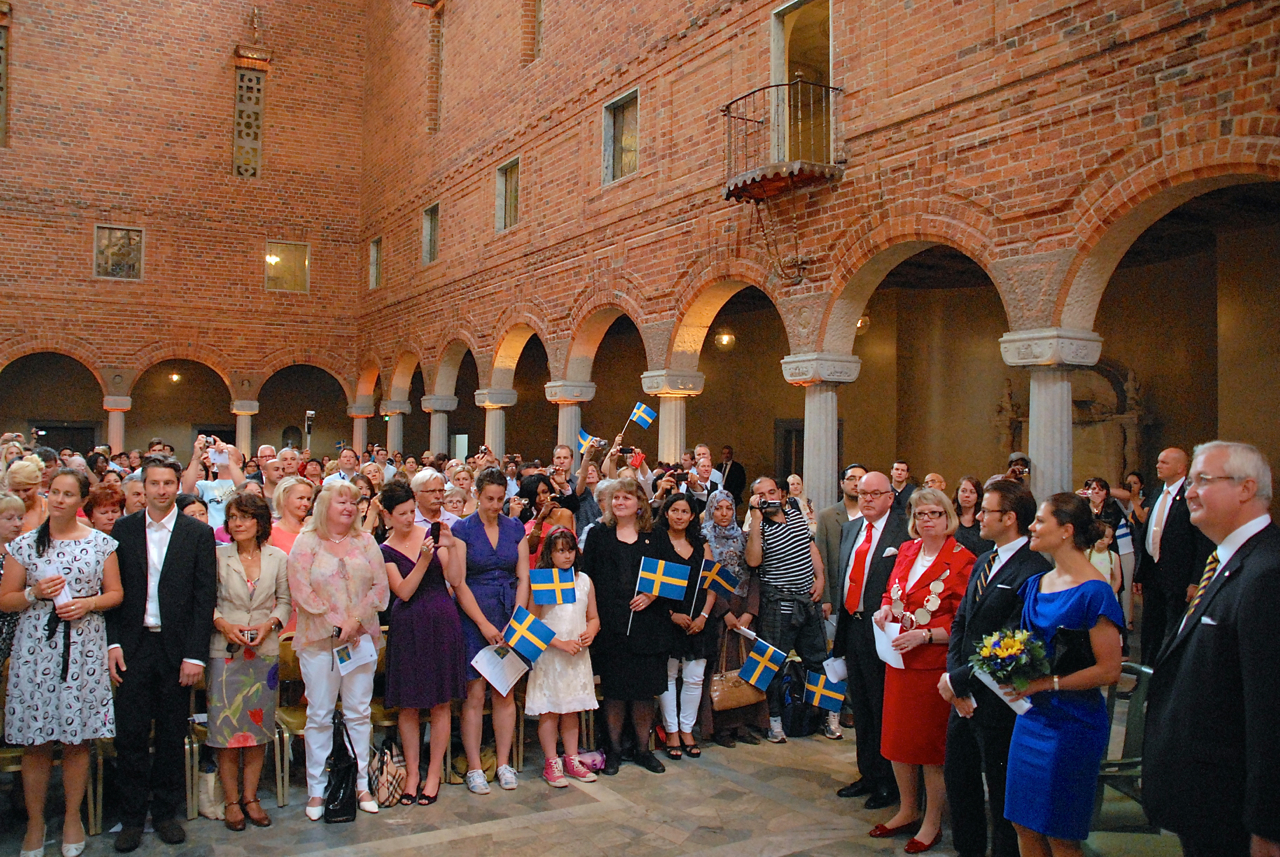 Medborgarceremoni på nationaldagen den 6 juni 2011 i Stockholms stadshus med bland annat kronprinsessan Victoria närvarande.